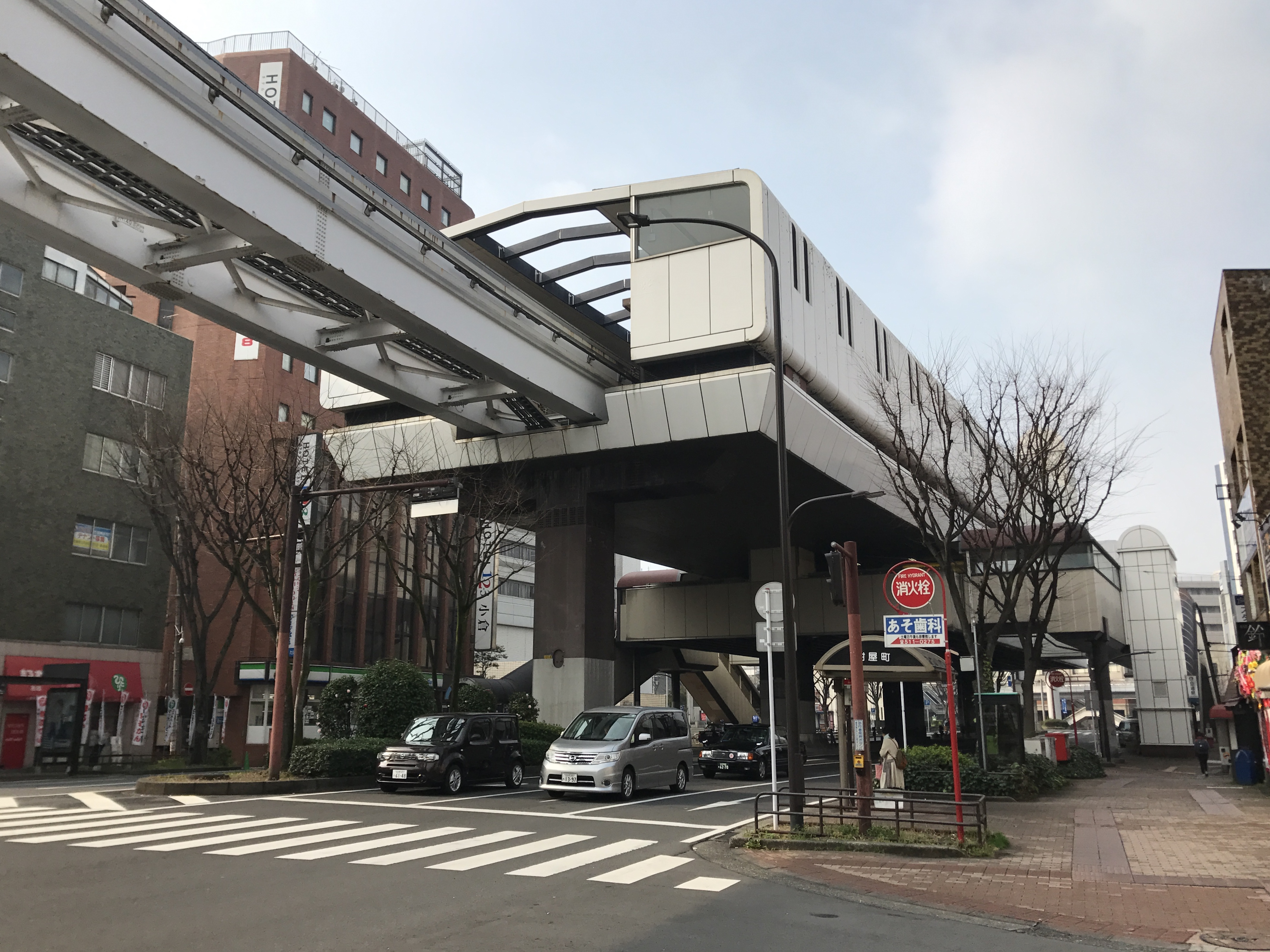 北側より望む旦過駅